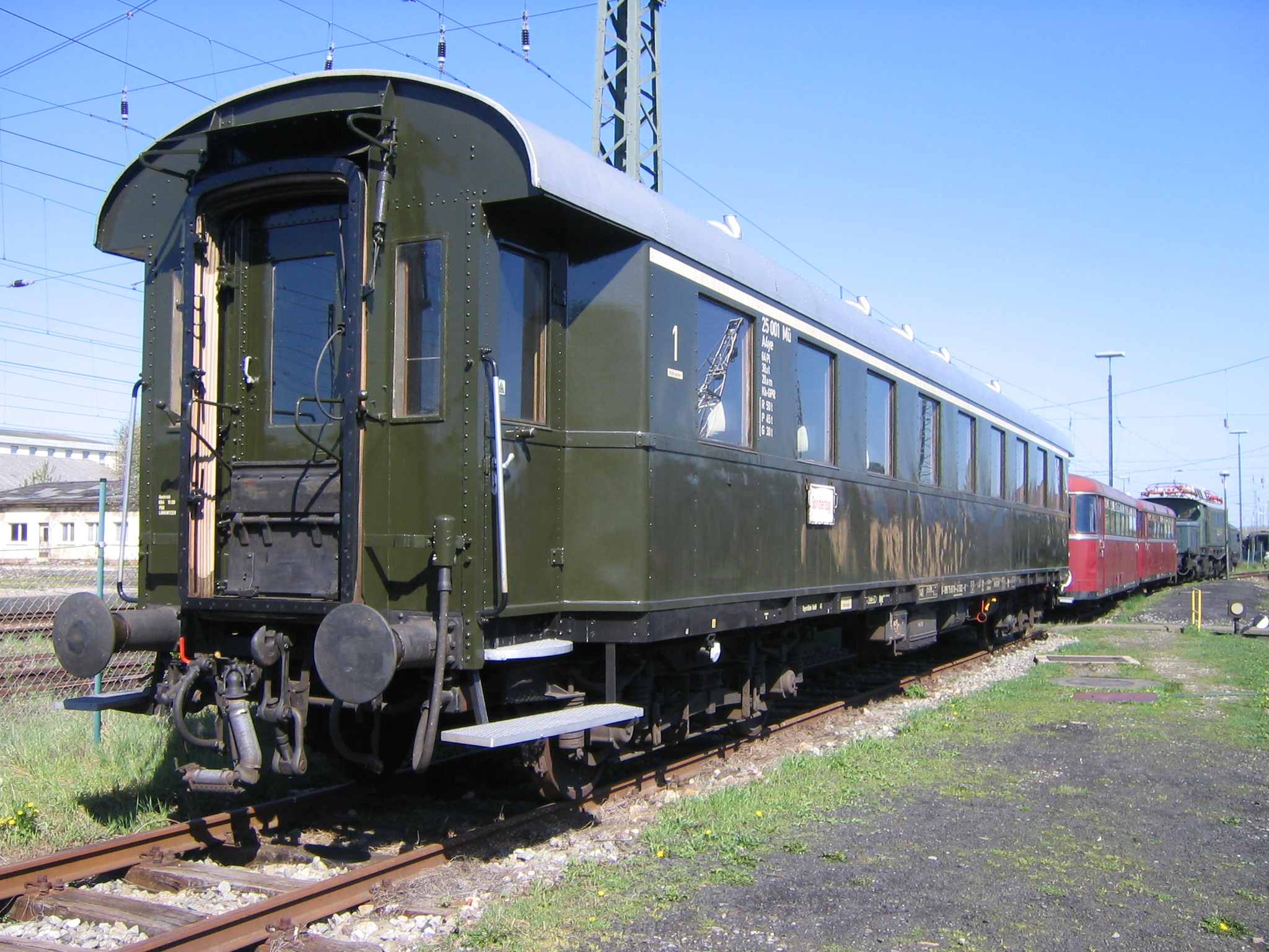 Der ehemalige B4üBay-29 25001 Sonderbauart "Karwendel" (einer von fünf Wagen dieses Typs, die eigens für die Karwendelbahn gebaut wurden) im Bayerischen Eisenbahnmuseum in Nördlingen